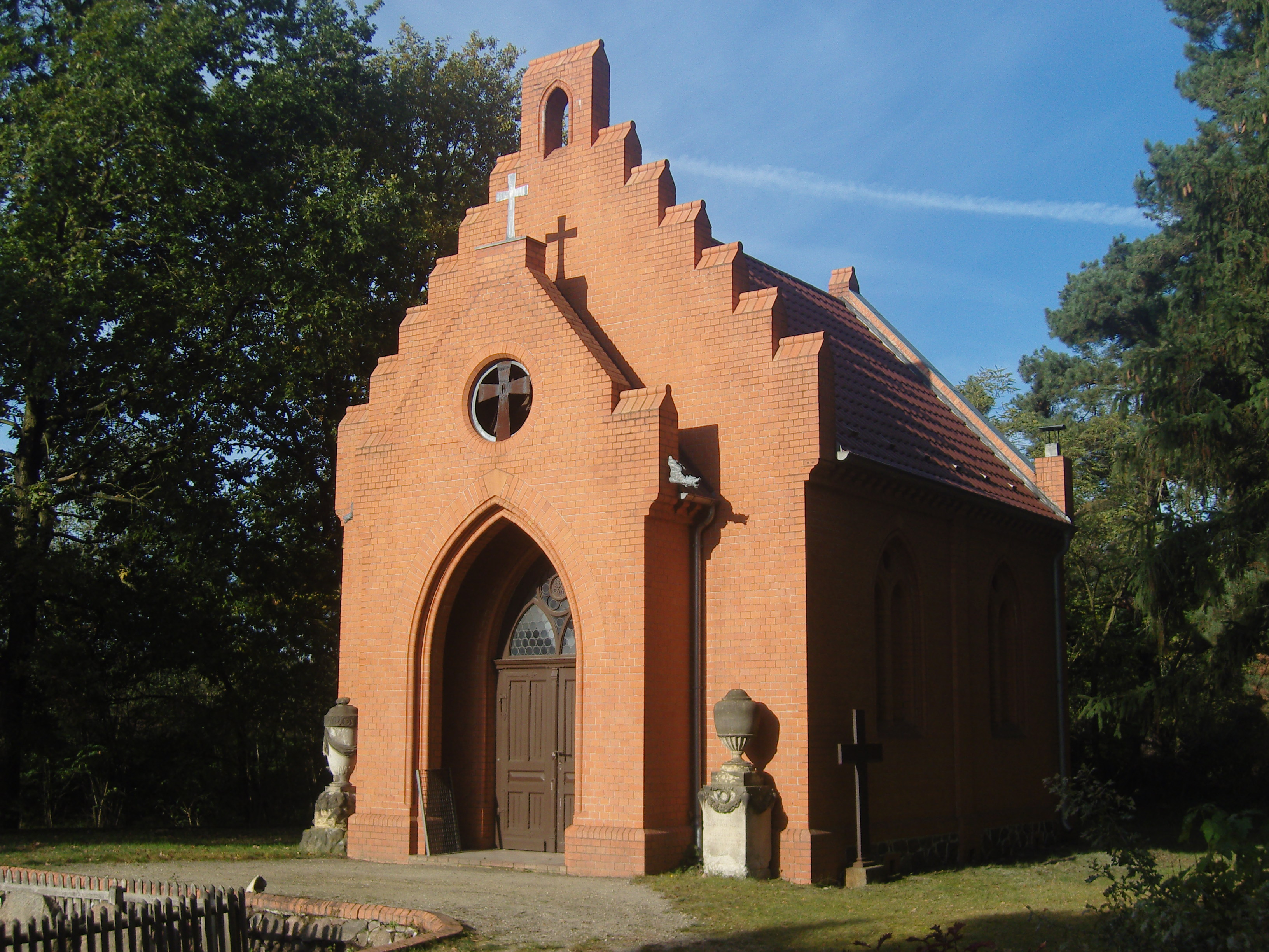 Friedhofskapelle in Buchwäldchen, Gemeinde Luckaitztal - Baudenkmal